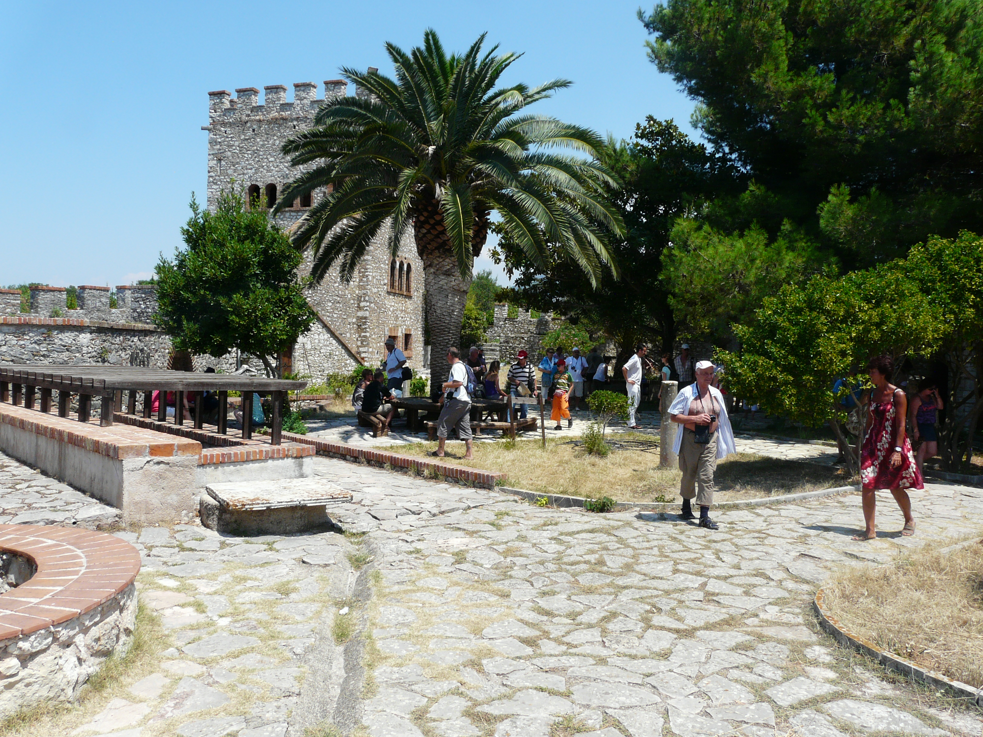 Corfu-Albania trip.